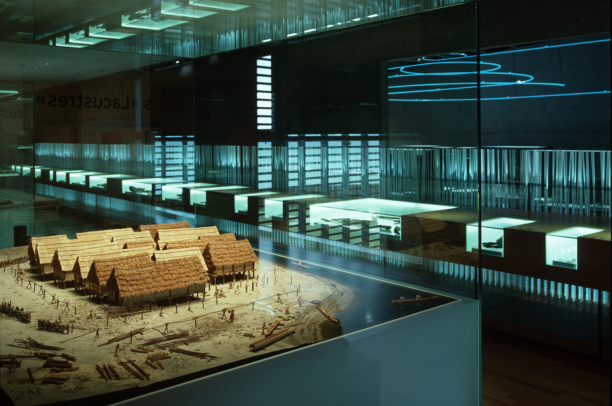 Photographie de la maquette de Cortaillod-Est exposée au Laténium, réalisée le 9.10.2001, par Yves André